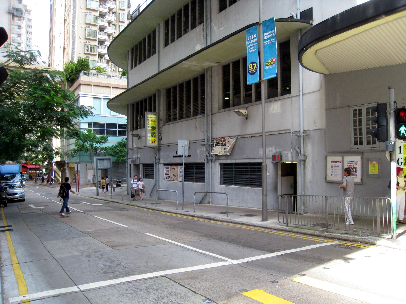 Wan Chai Road 灣仔道